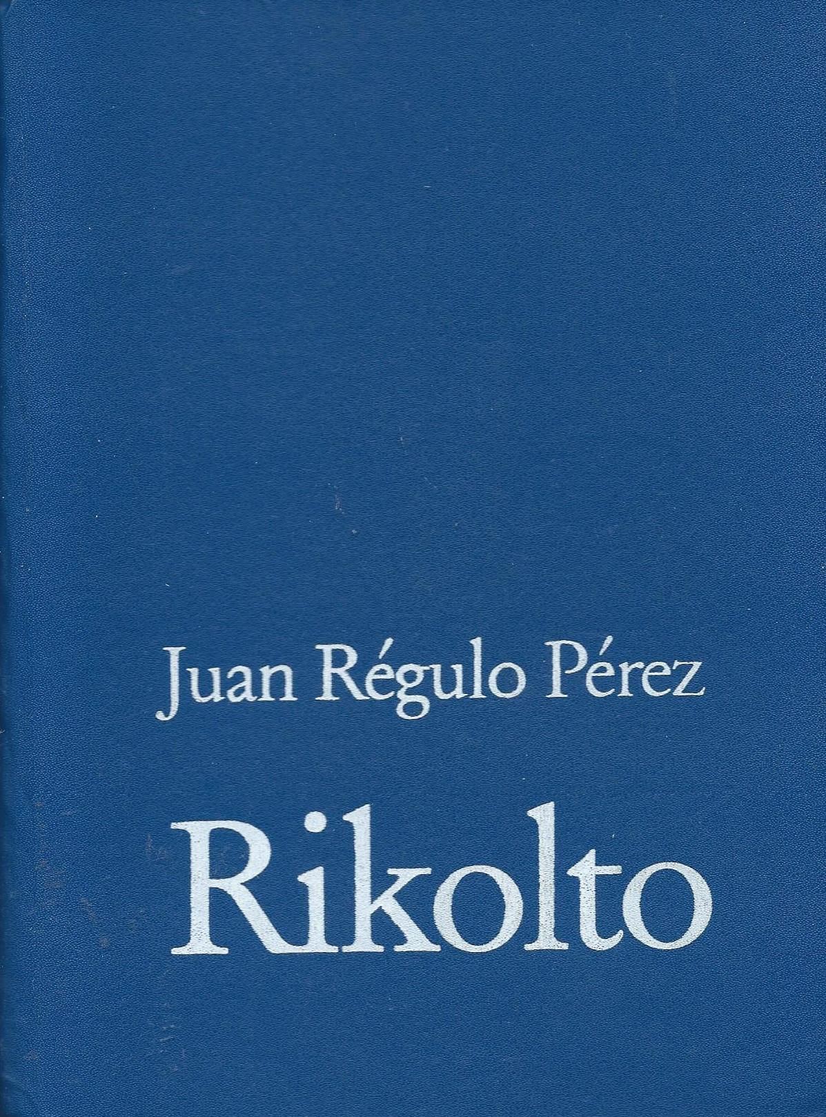 Librokovrilo de "Rikolto",1992